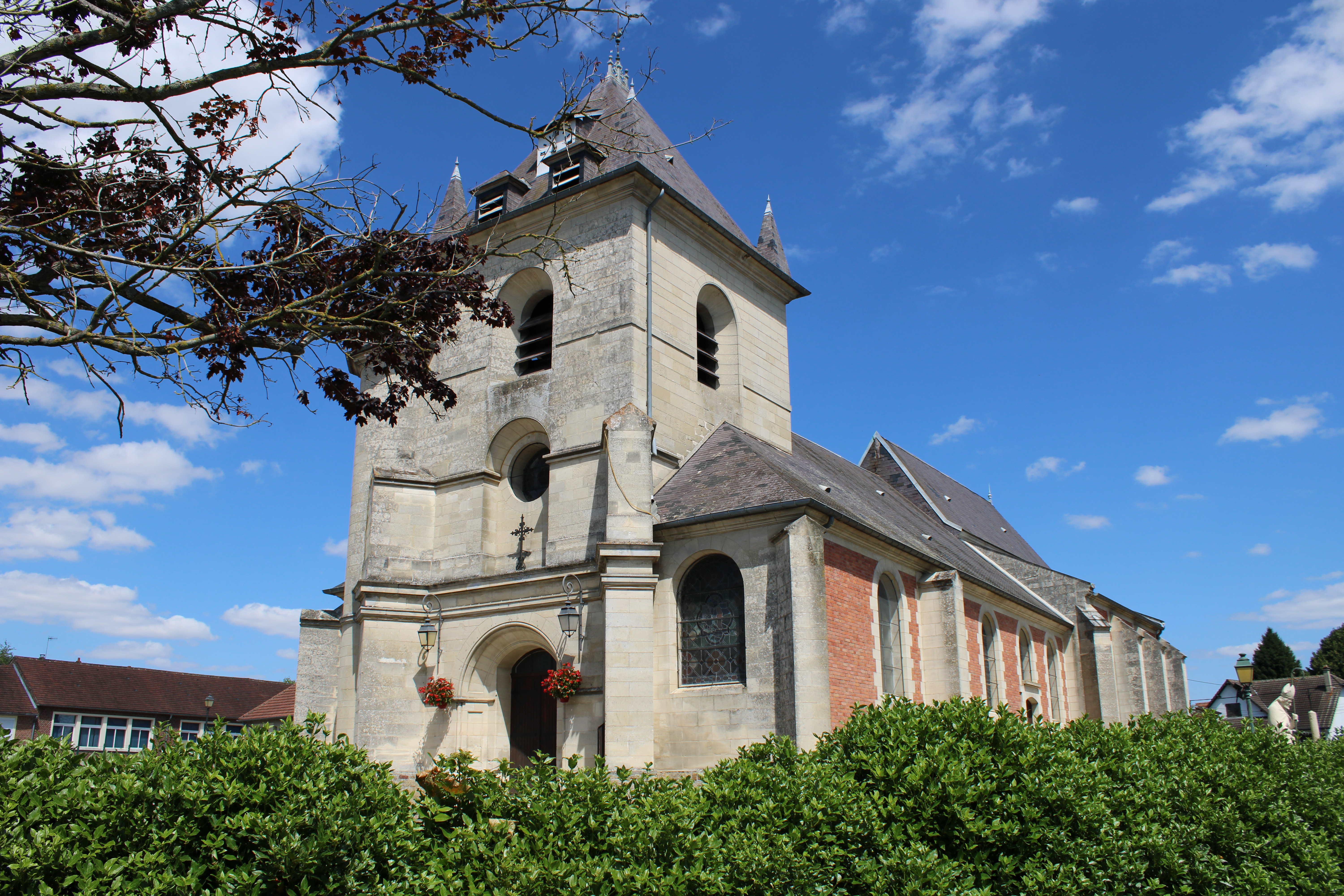 L'église.